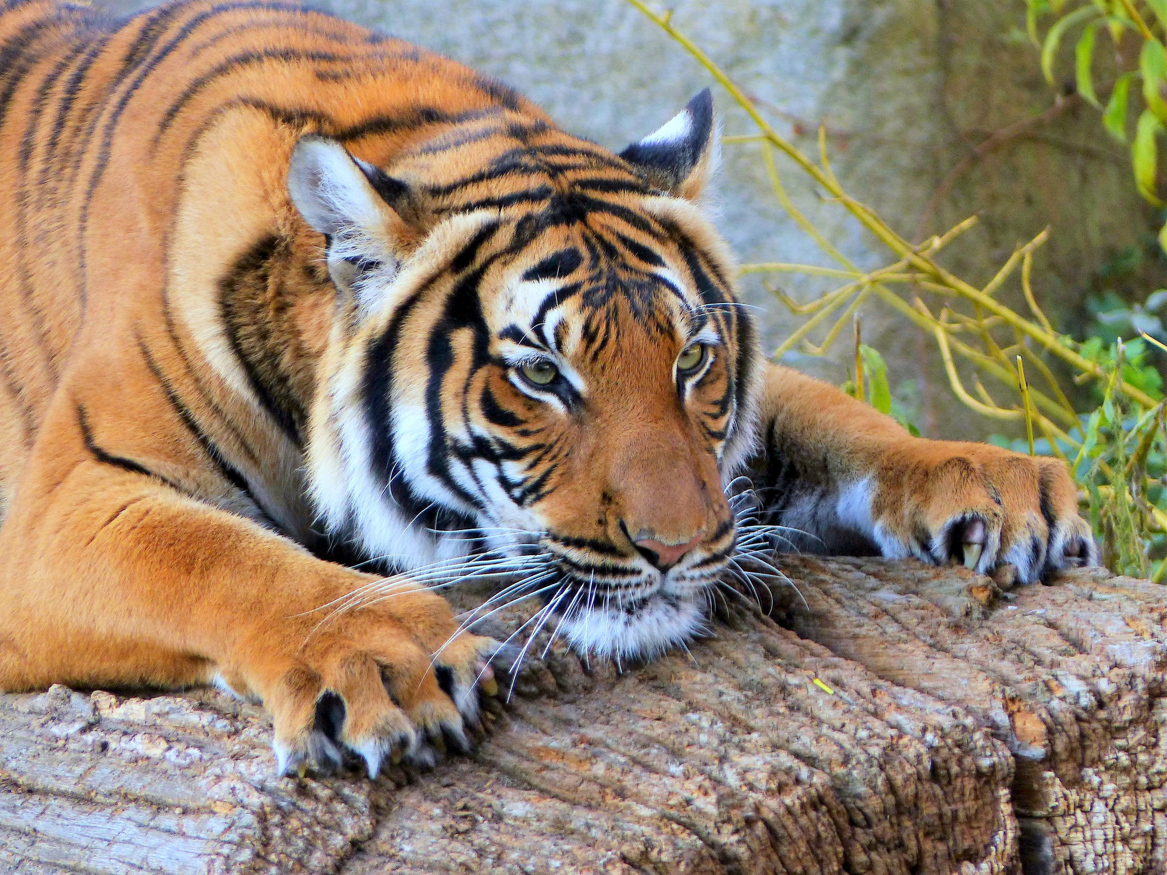 auf dem Sprung